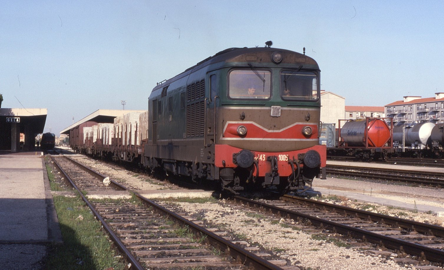 Locomotiva D.443.1005 delle Ferrovie dello Stato in sosta a Gela